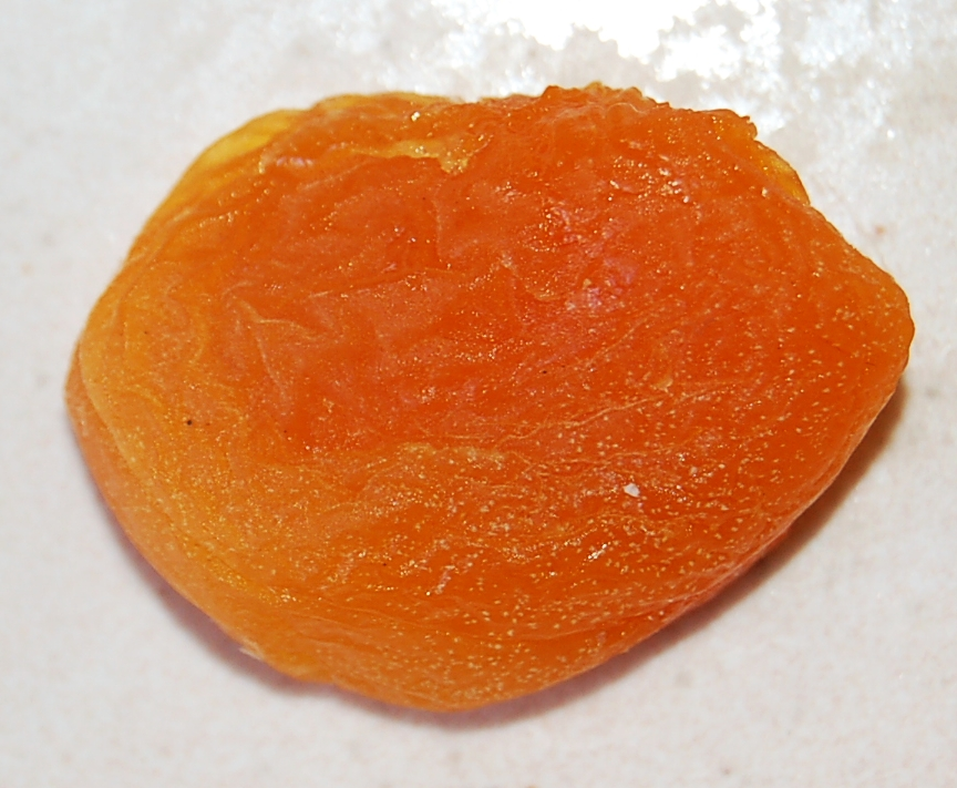 Abricot sec - dry apricot